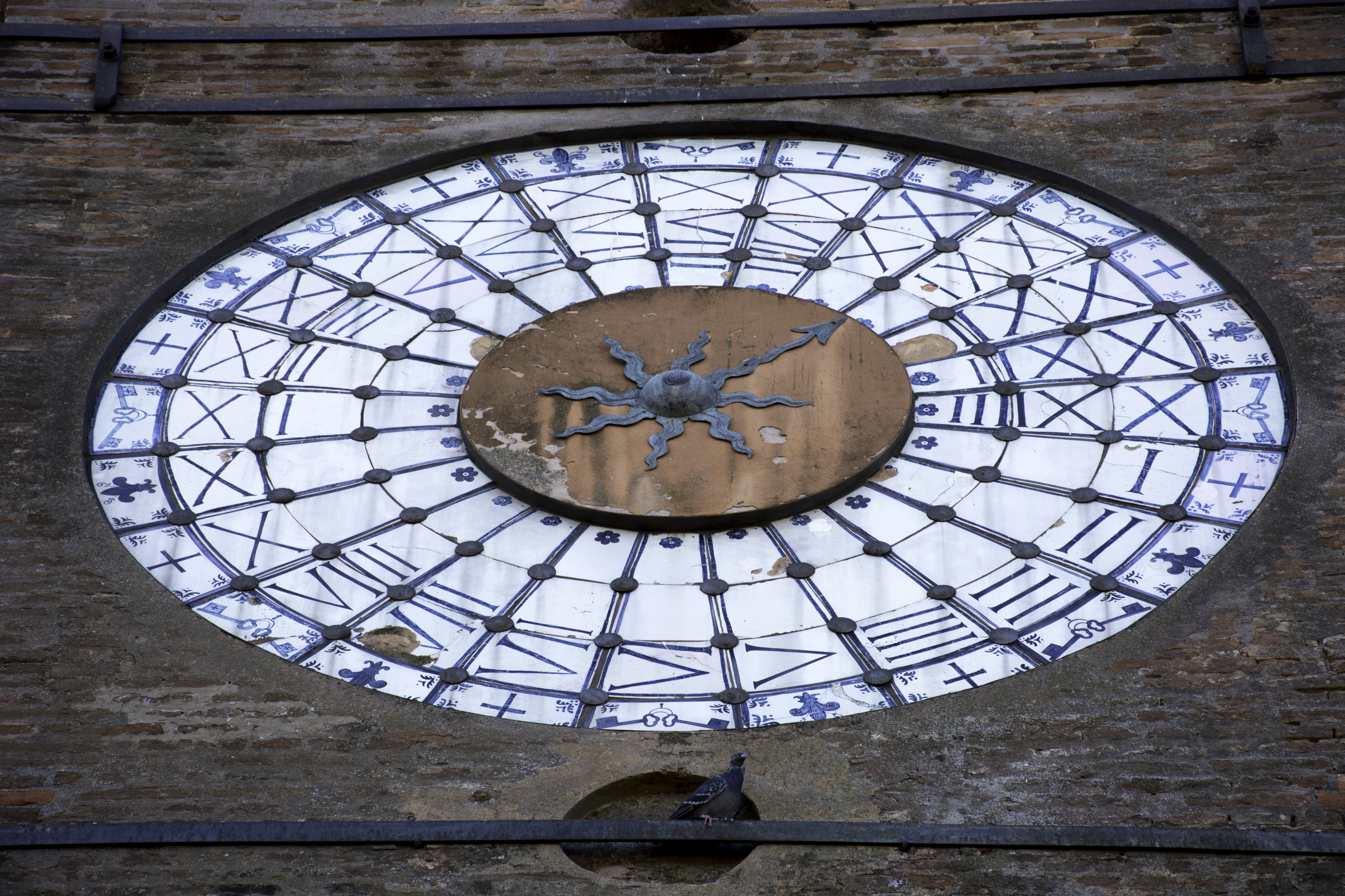 lavatoio pubblico This is a photo of a monument which is part of cultural heritage of Italy.